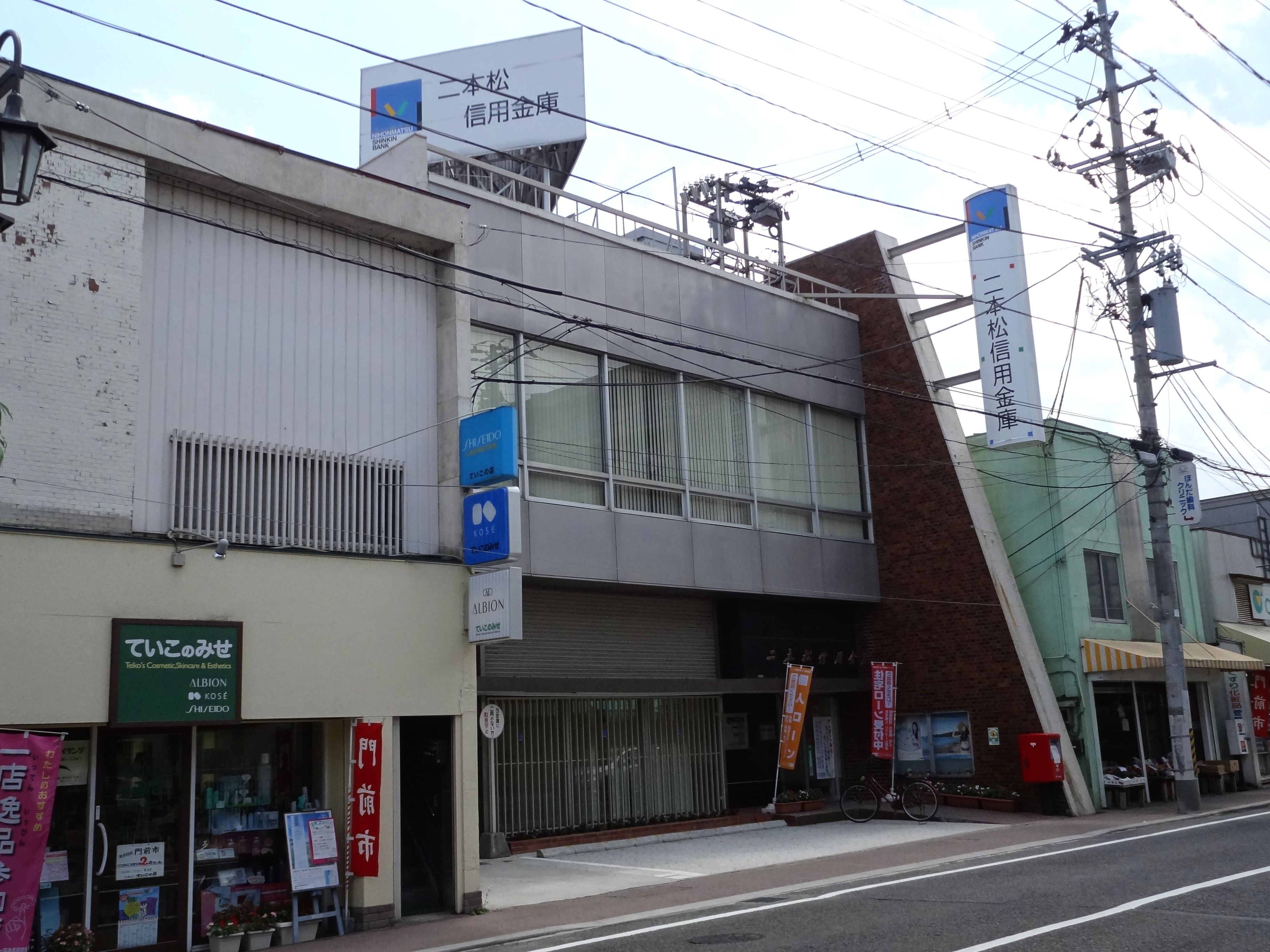 二本松信用金庫本店